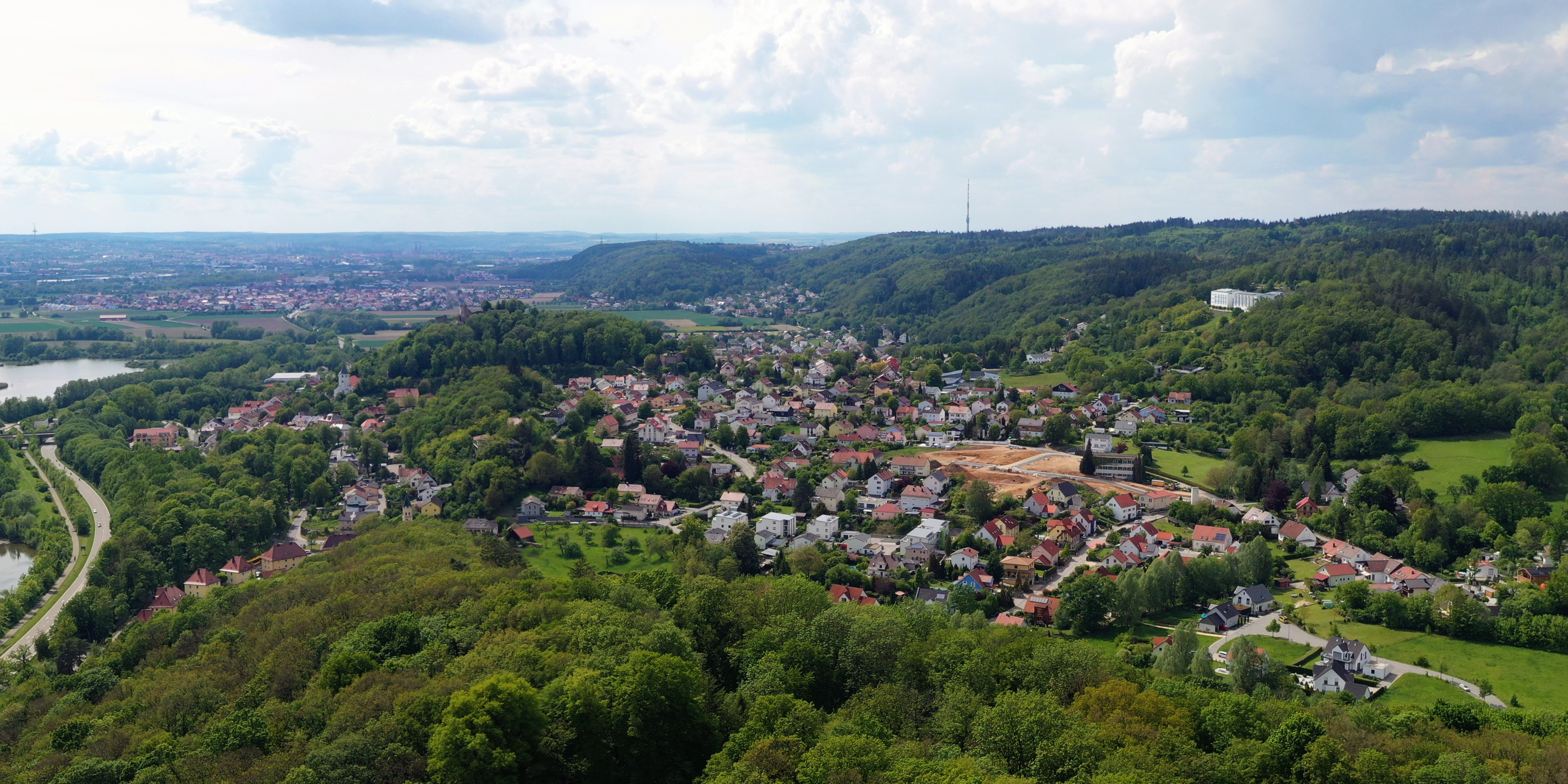 Donaustauf an der Donau (von der Walhalla aus fotografiert)